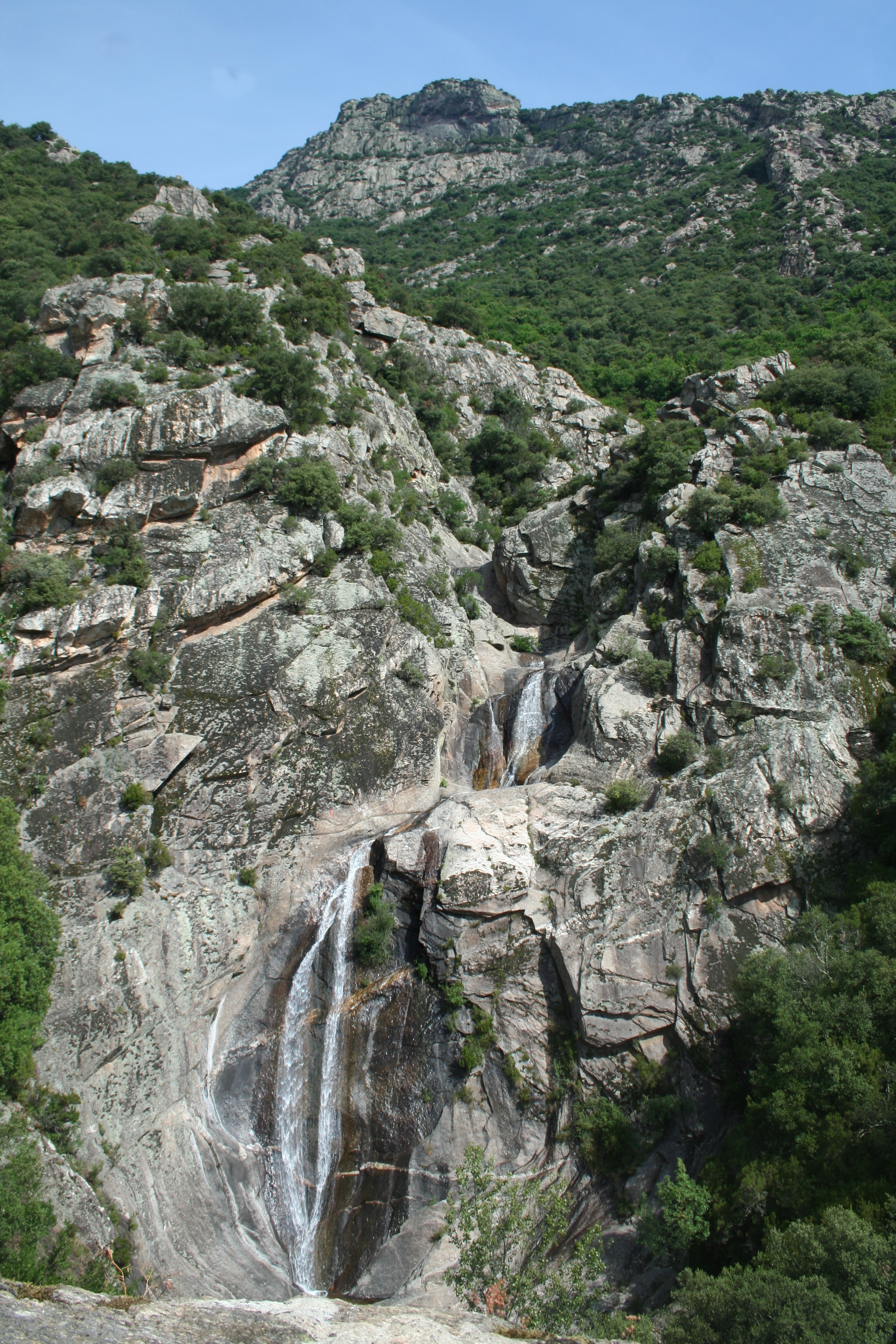 Colombières-sur-Orb (Hérault) - cascade « le voile de la mariée » du ruisseau d'Albine